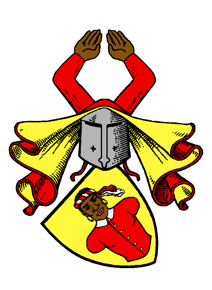 Stammwappen der hessischen von Uffeln (Stammsitz Burguffeln bei Kassel)